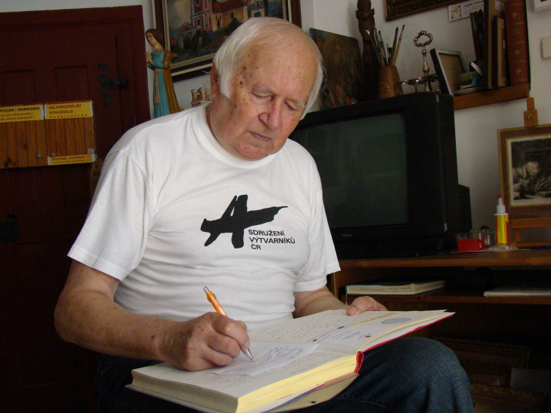 Stanislav Příhoda foto: Stanislav Vrtiška